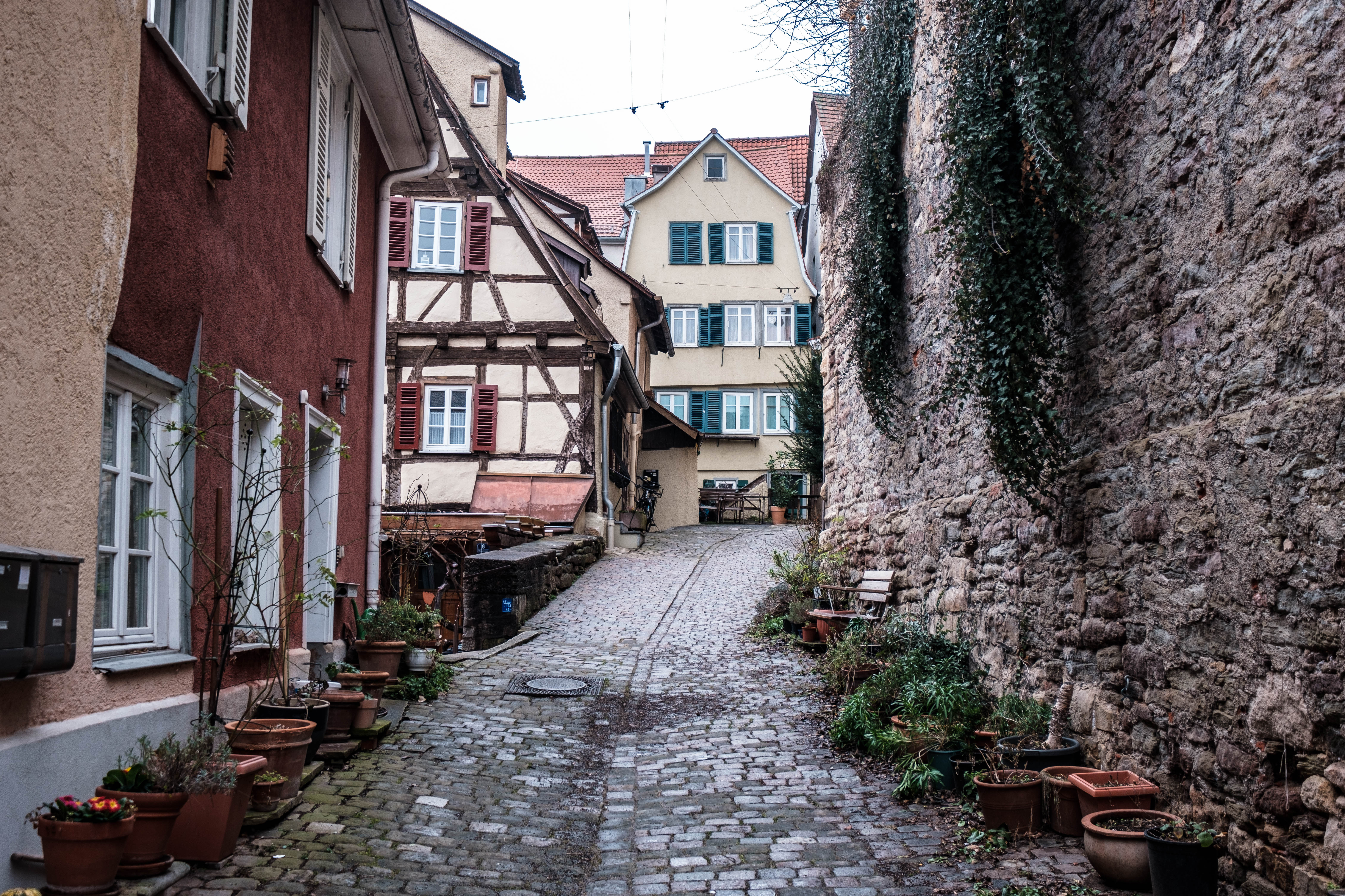 Clinicumsgasse in Tübingen